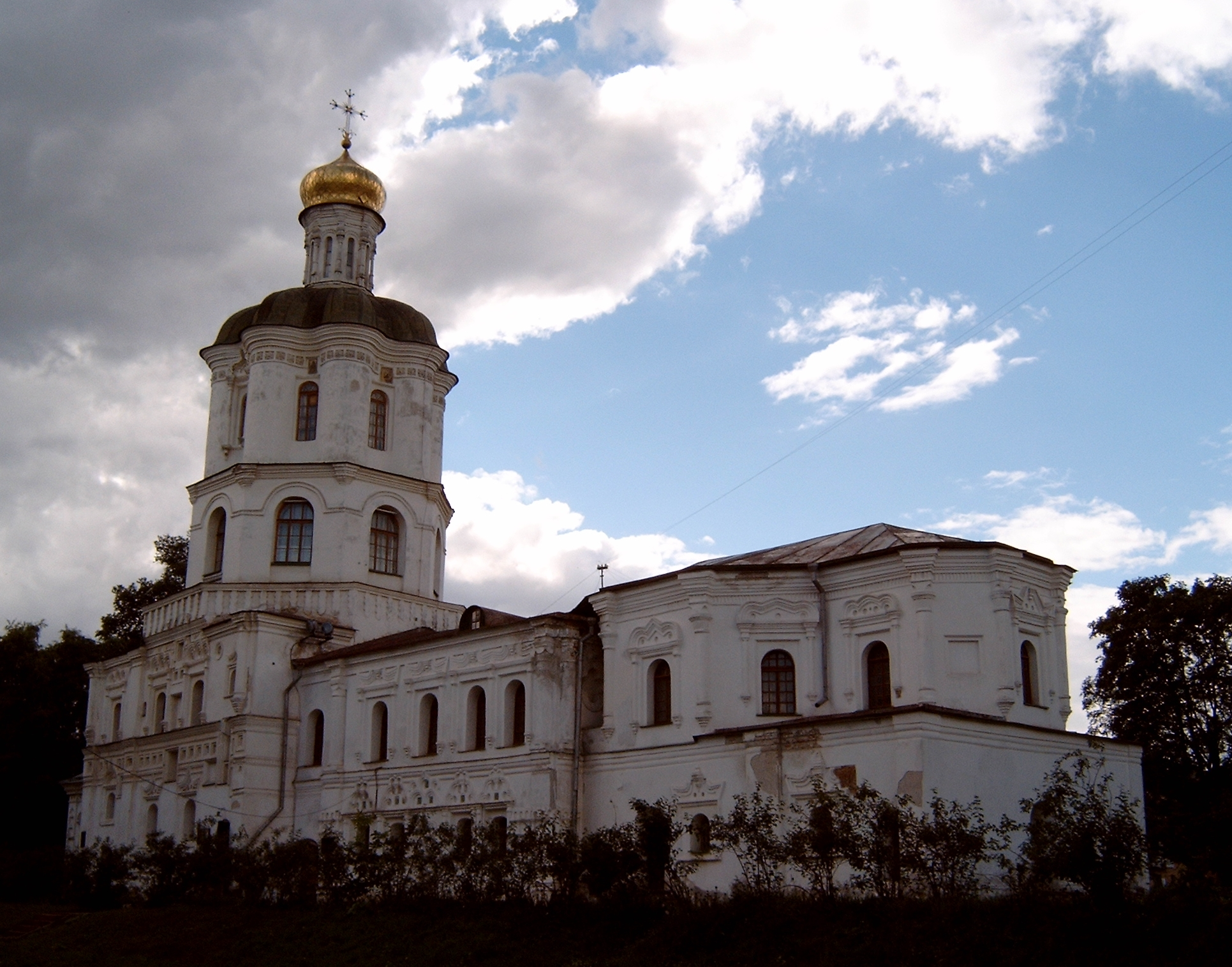 Фотографія будинку Чернігівського Колегіуму.